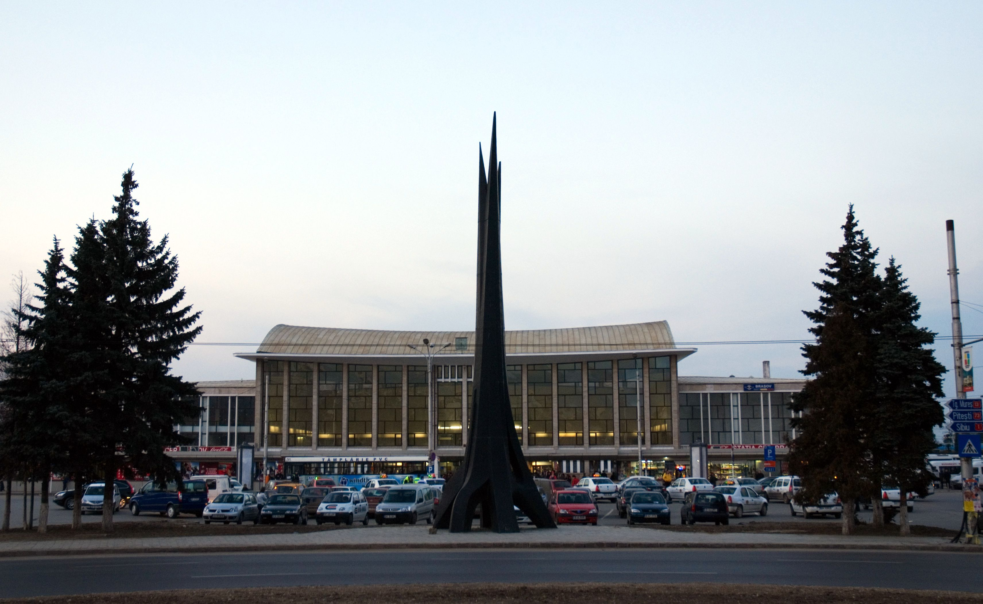 Braşov main railstation